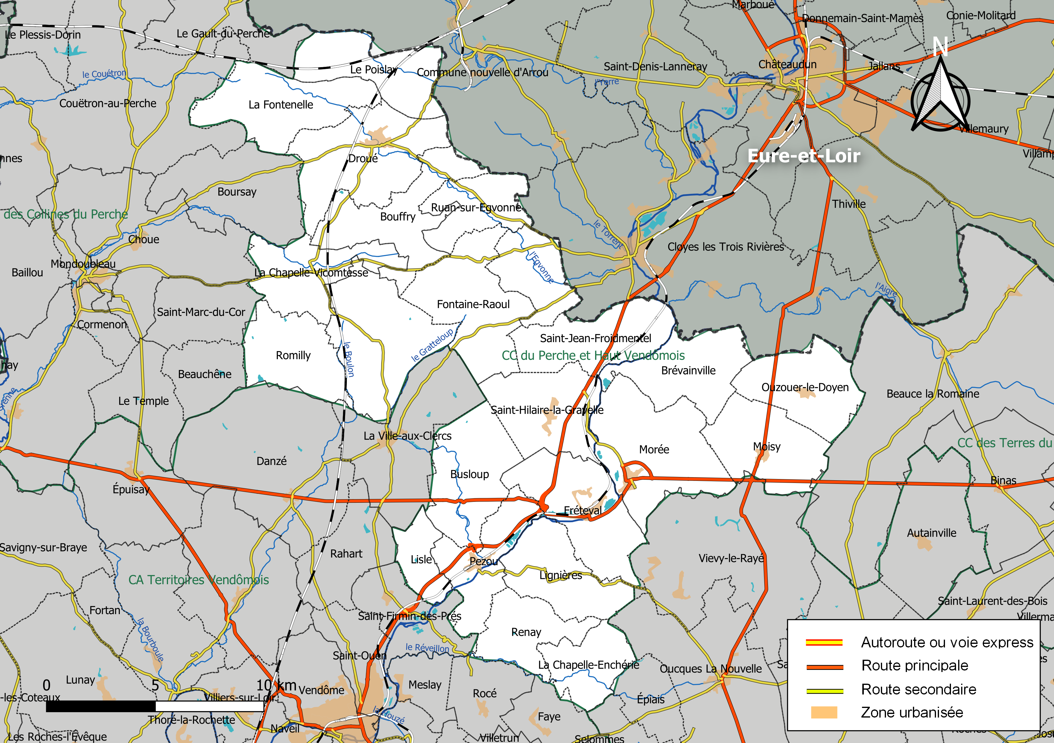 Carte de la communauté de communes du Perche et Haut Vendômois, département de Loir-et-Cher, France. Composition au 1er janvier 2019.